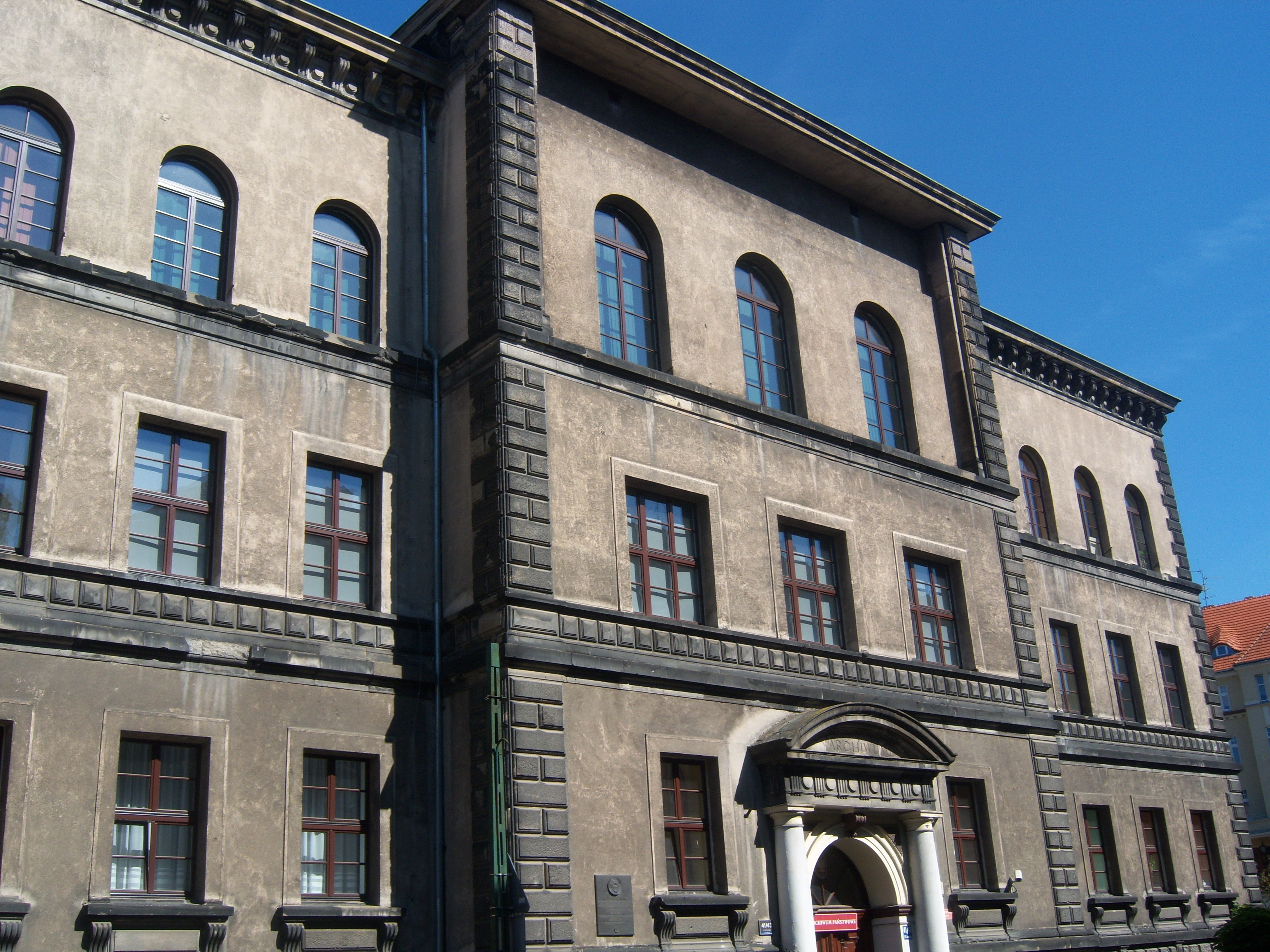 Poznań, ul. 23 Lutego 41/43 - w latach 1879-1919 Najwyższy Sąd Krajowy, obecnie archiwum, 1879-1882 (zabytek nr A 220)